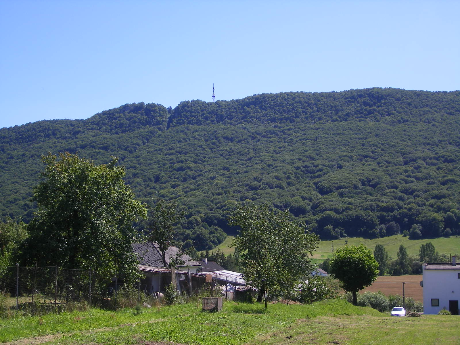 Jólész - háttérben a Szilicei-fennsík pereme